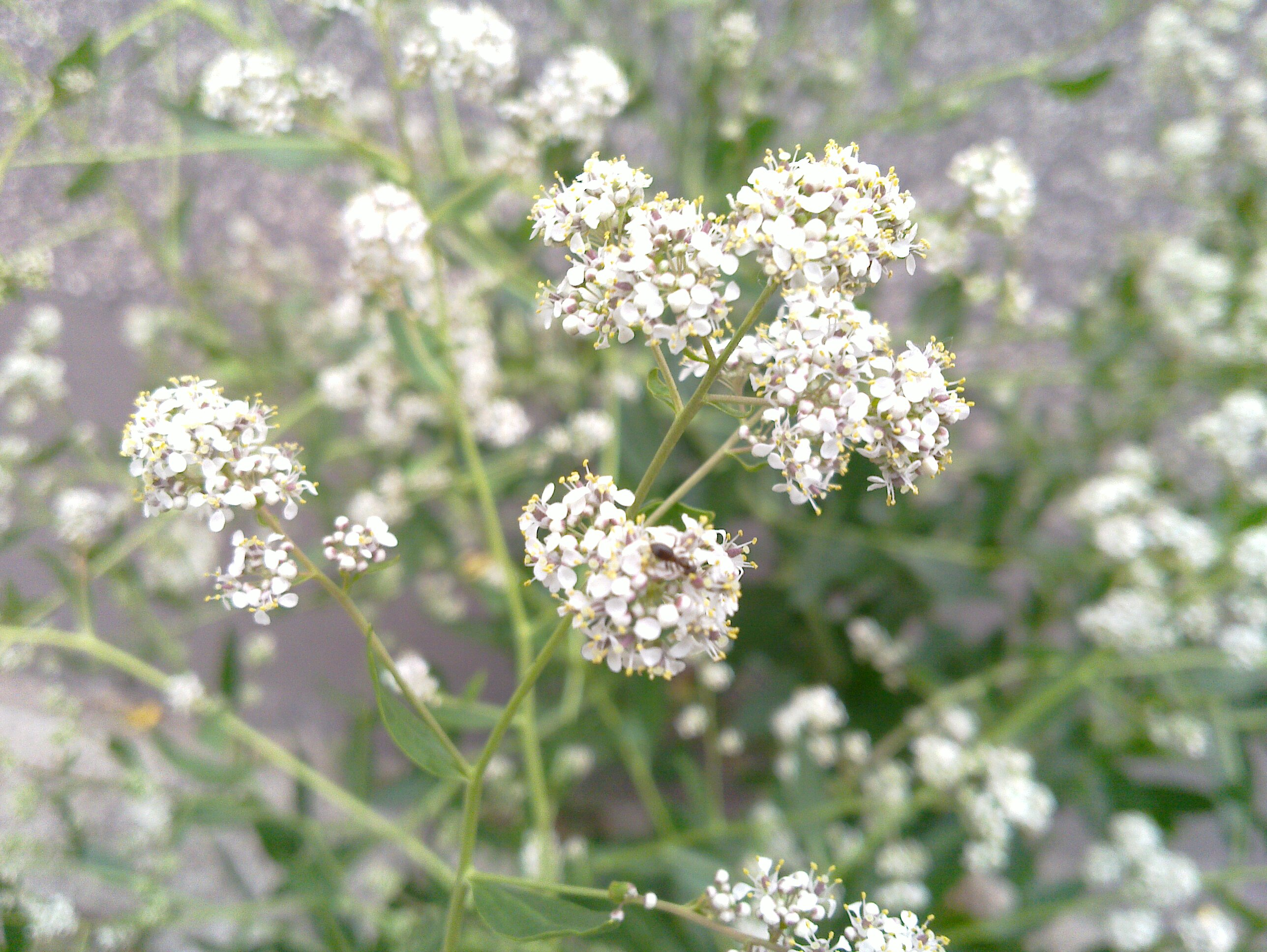 Lepidium latifolium -wild